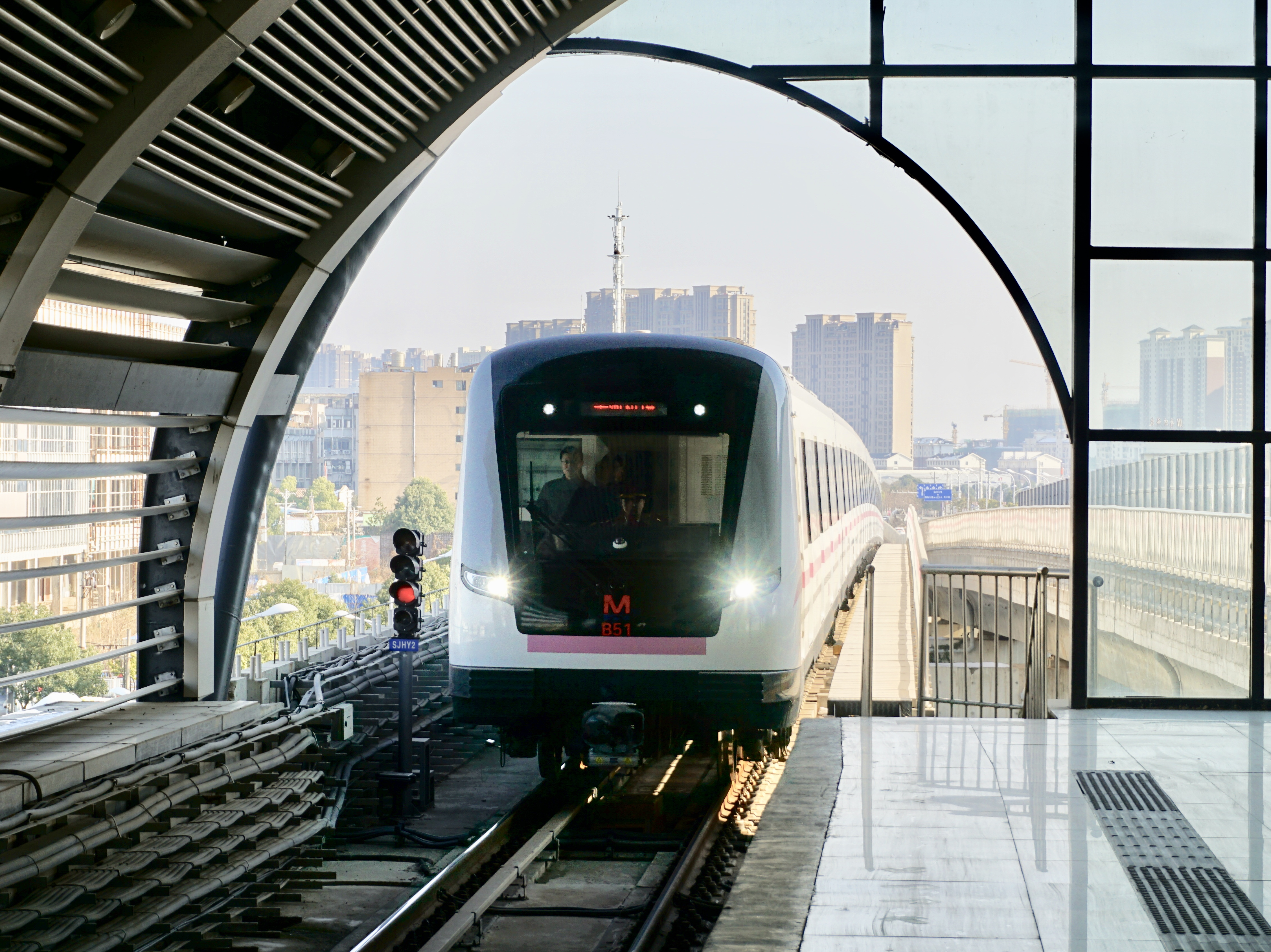 武汉轨道交通2号线列车